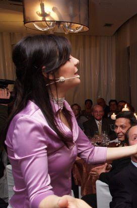 Festa particular de aniversário de António Ezequiel